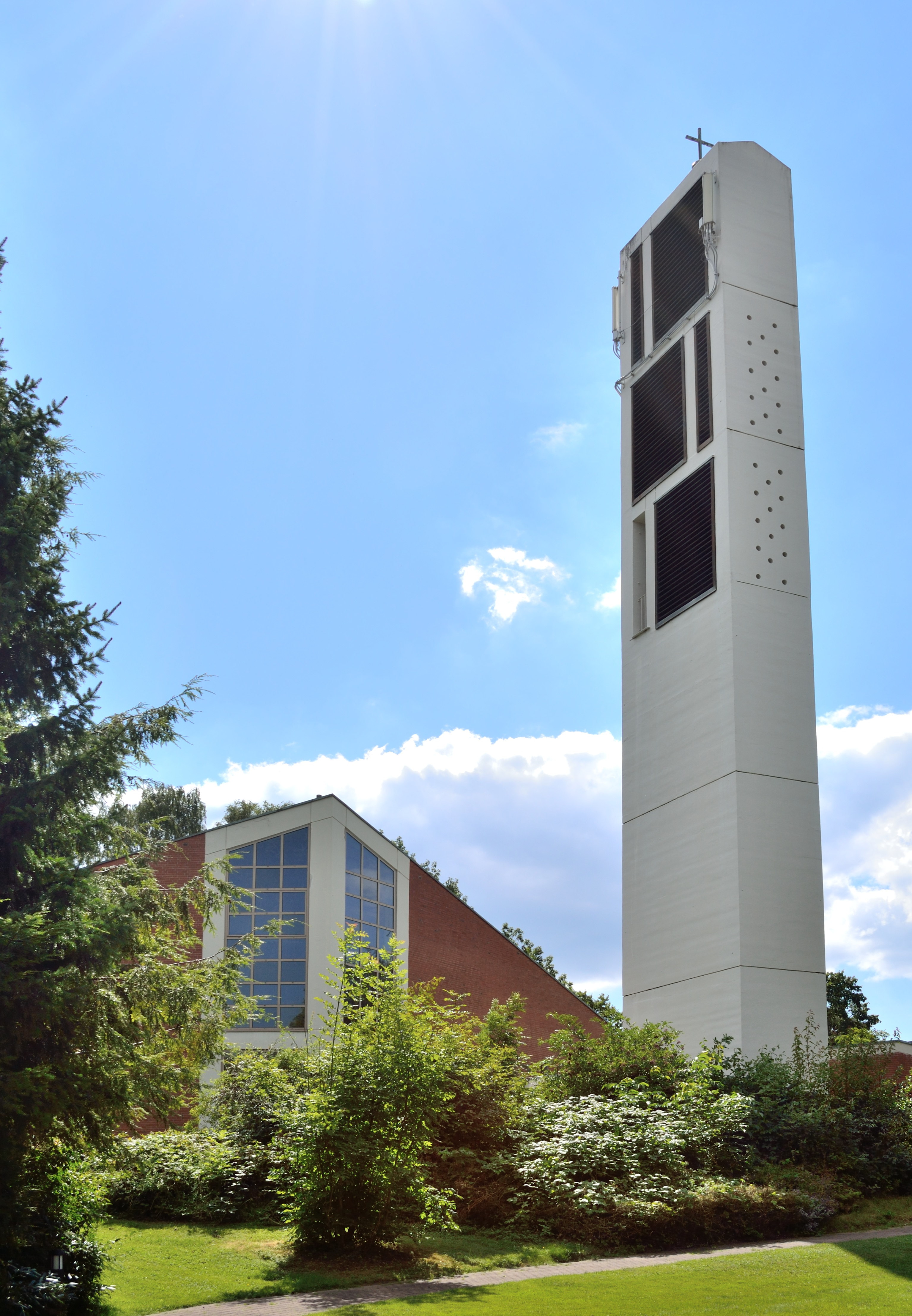 Evangelisch-reformierte Kirche in Detmold/Pivitsheide VL